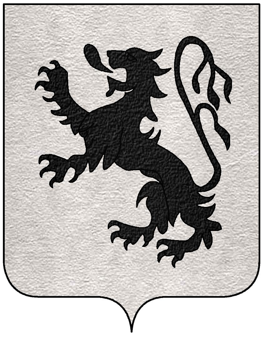 Stemma della famiglia Acciaioli